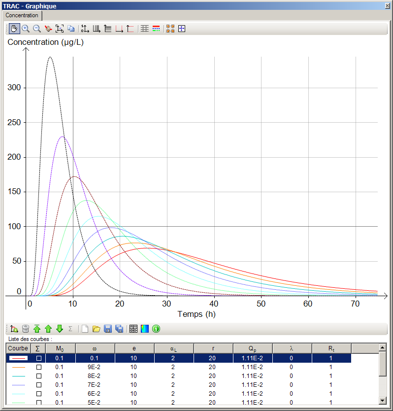 Simulation de courbes de restitution du traceur